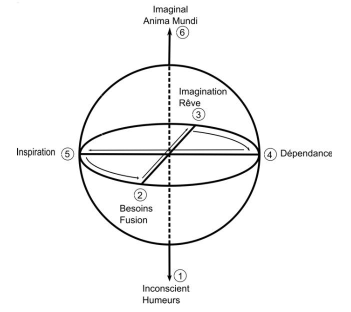 Application aux significations de la Lune.